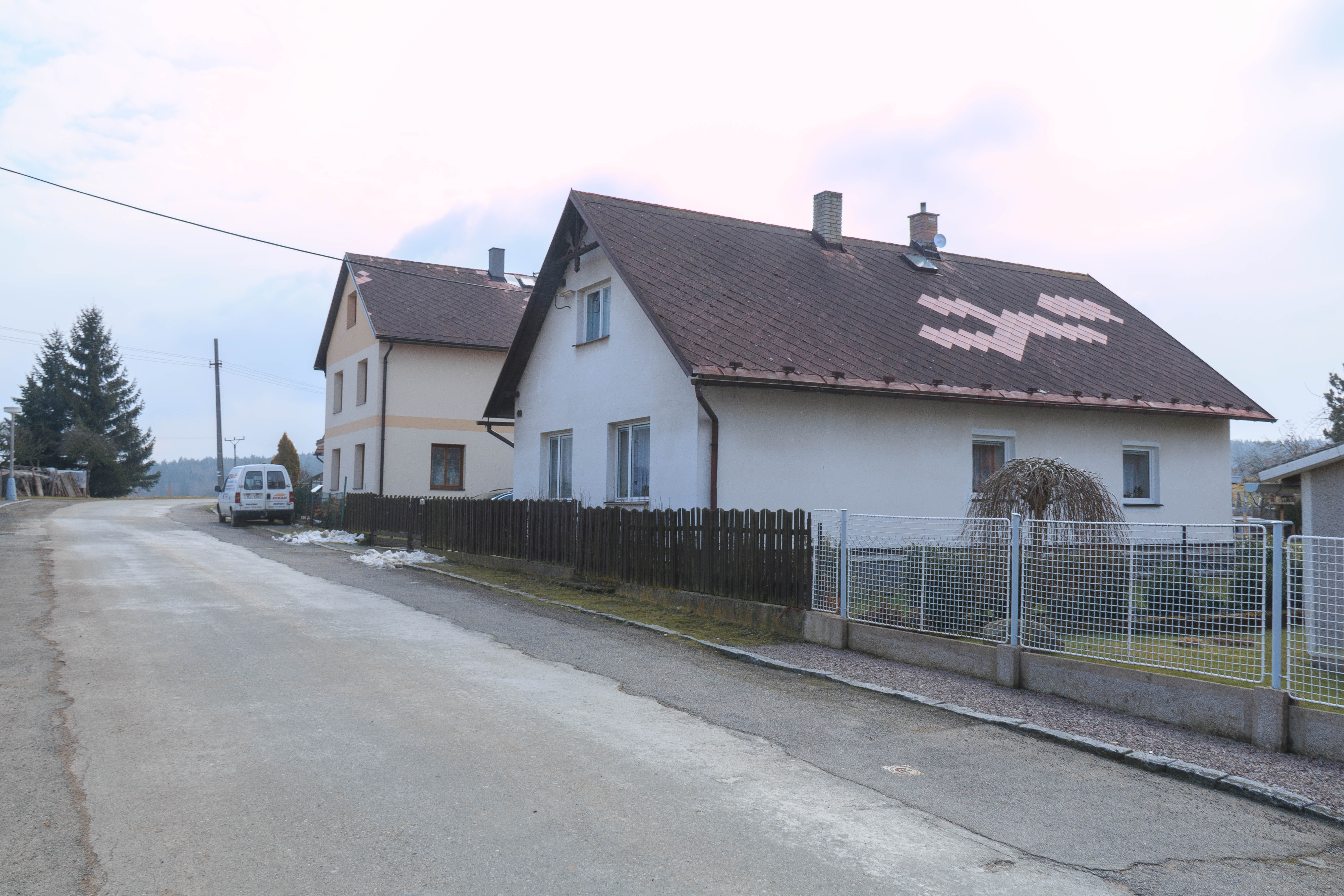 Ctětínek čp. 49